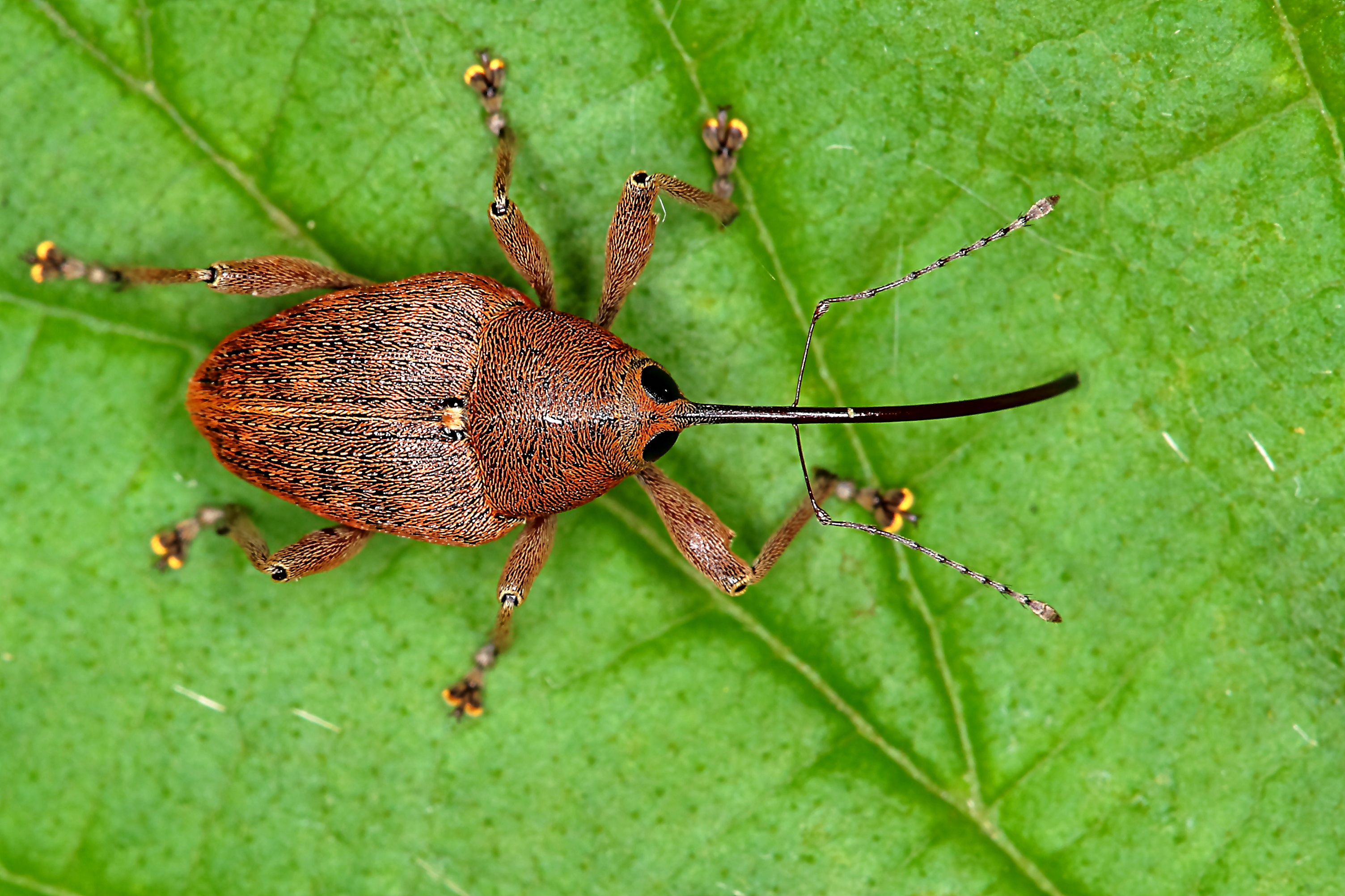 Haselnussbohrer